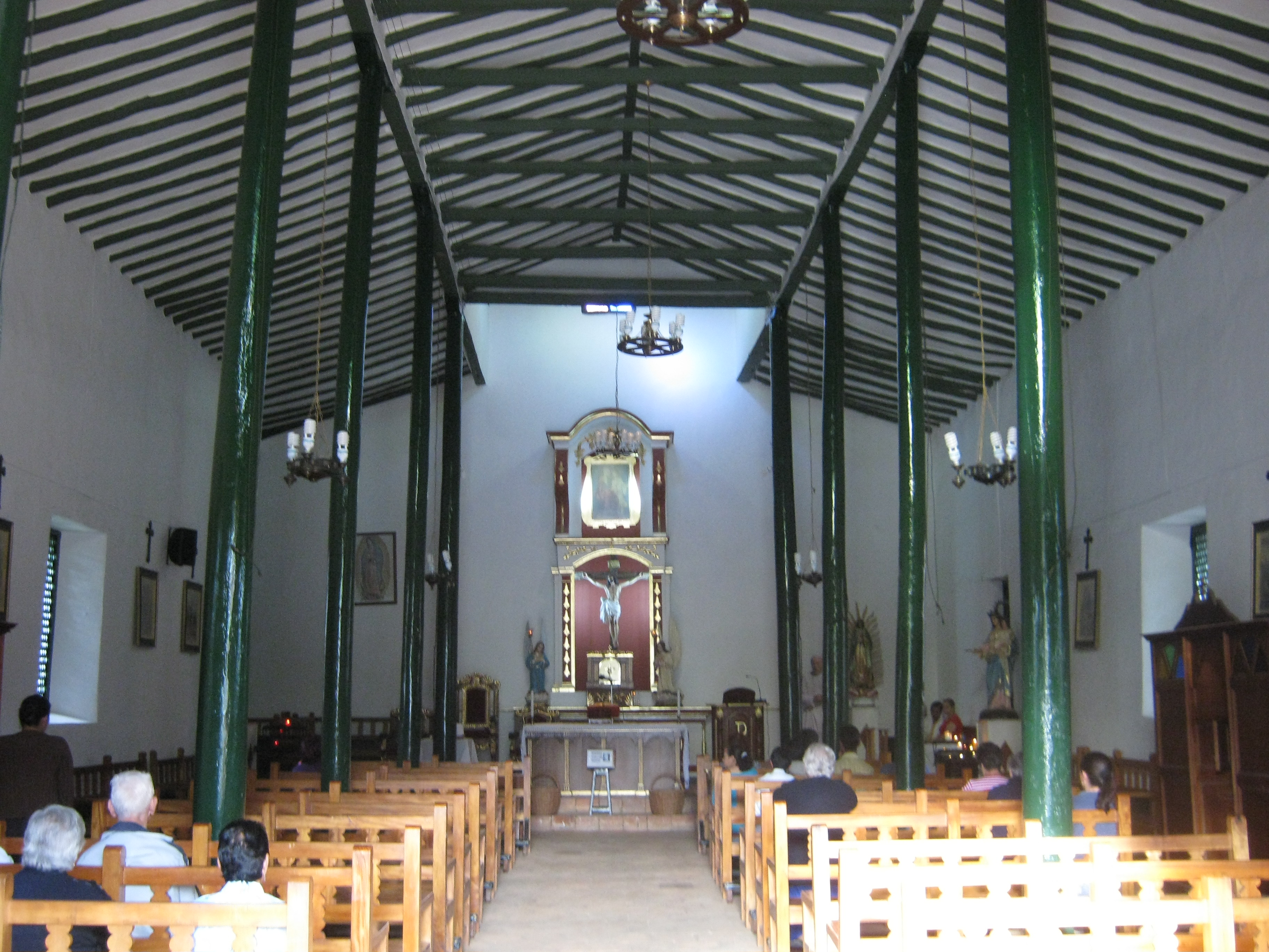 Capilla de Santa Ana, localizada en el municipio de Guarne, Antioquia. Colombia.